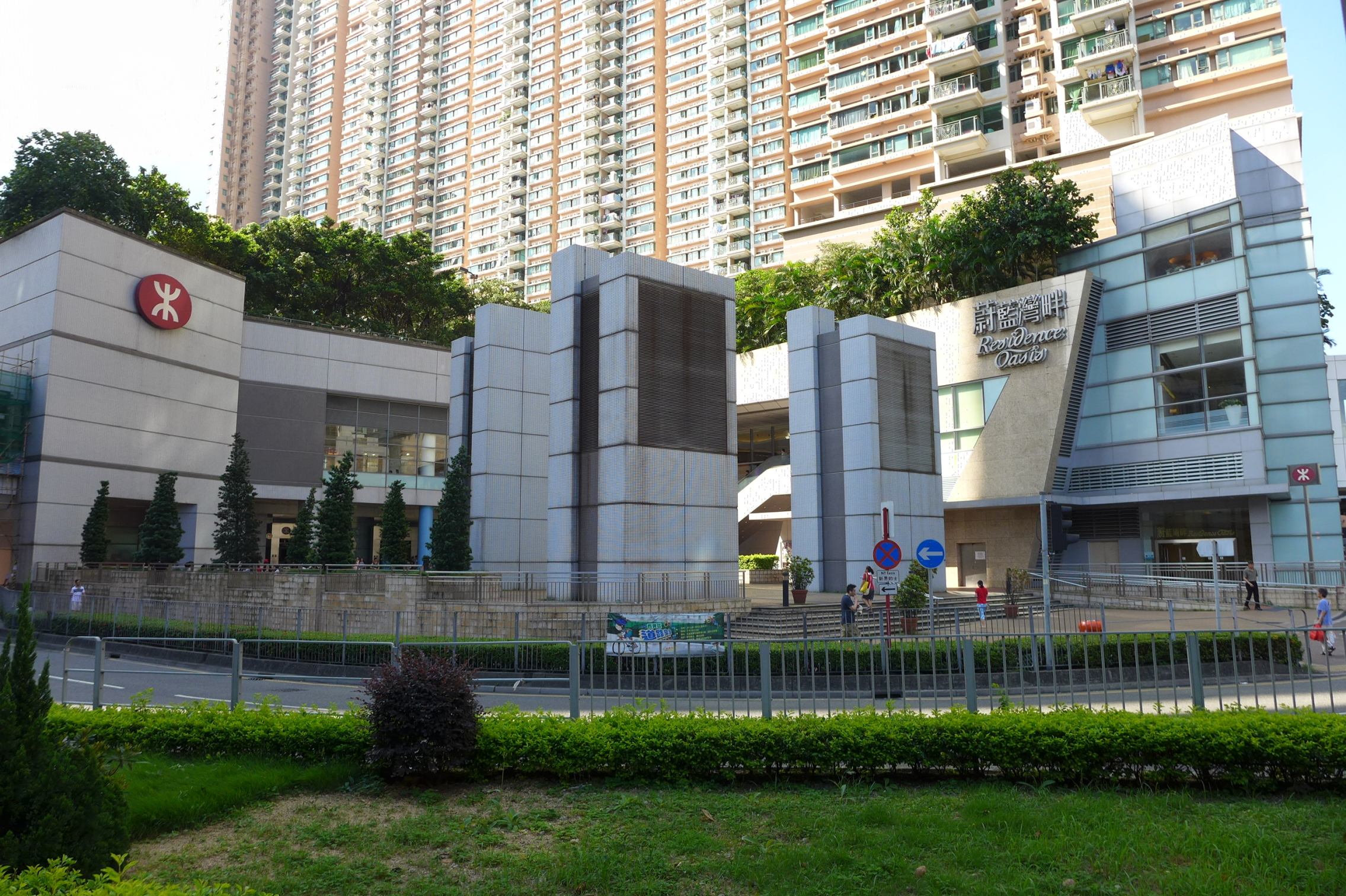 Hang Hau Station Exterior View